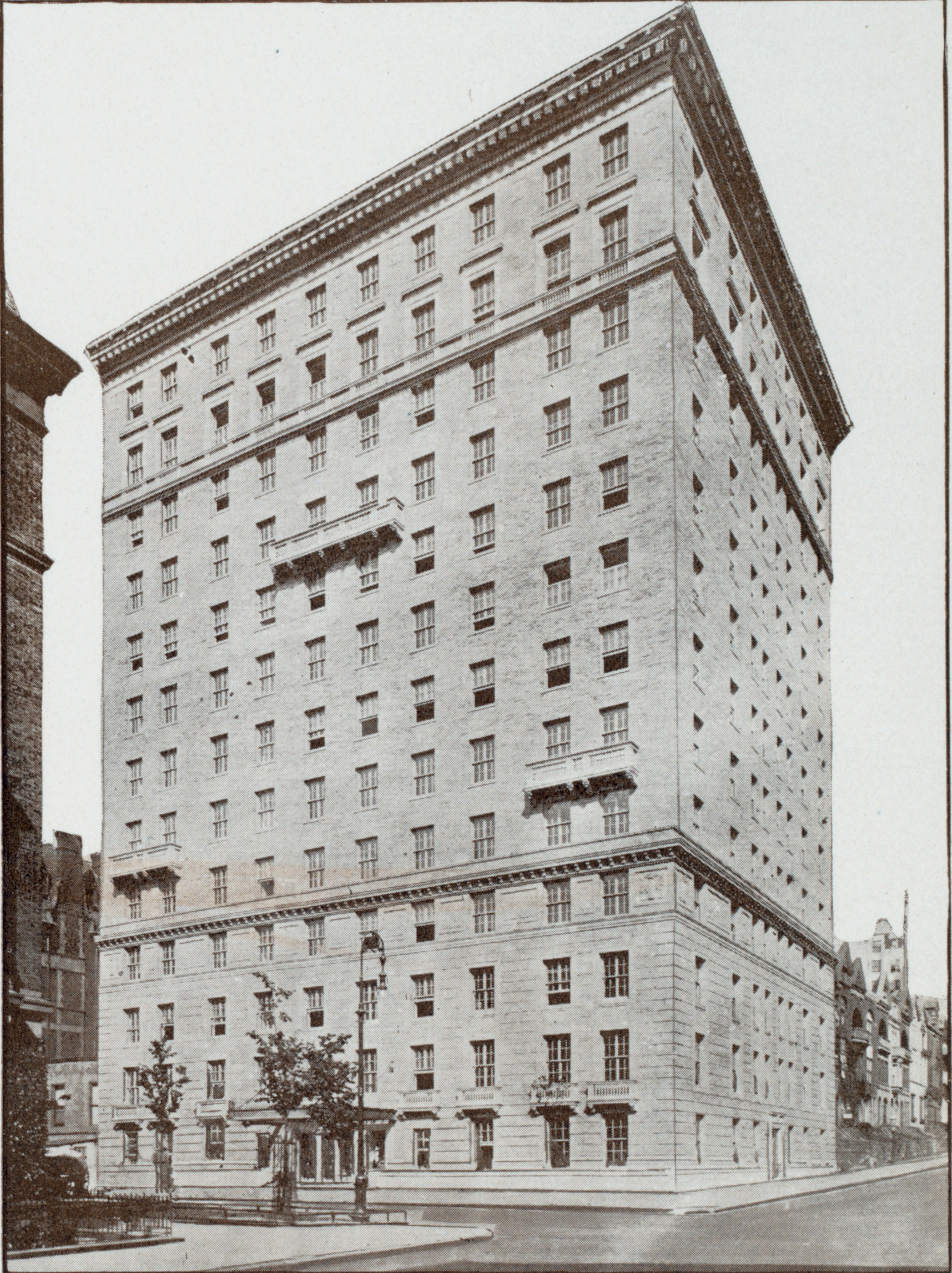 246 West End Avenue, Upper West Side, Manhattan, New York City